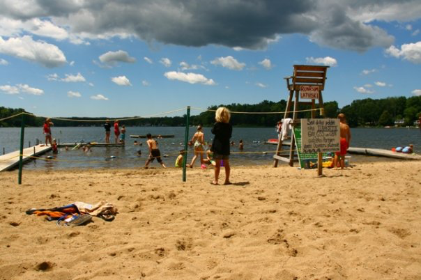 Pludmale